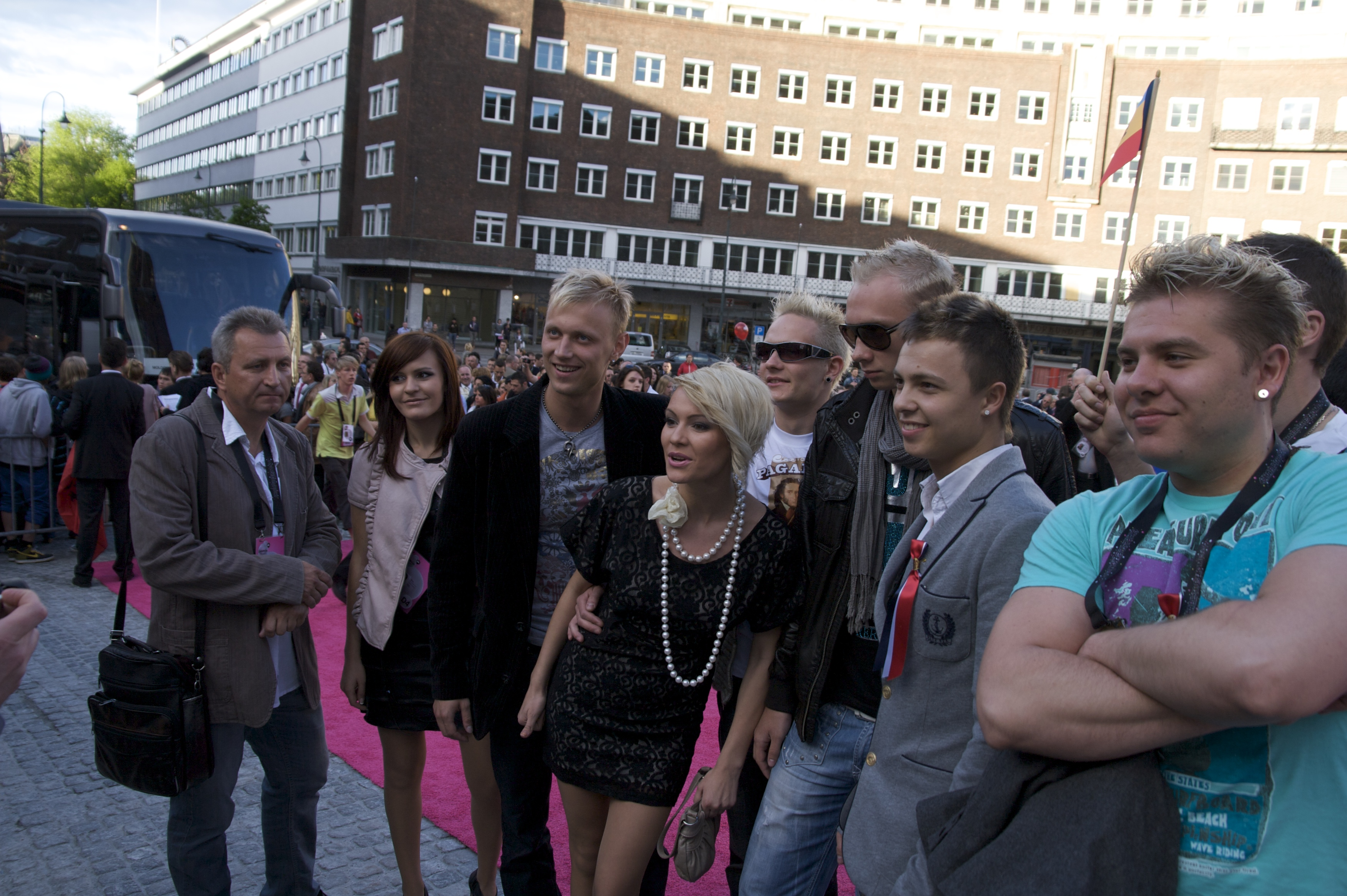 Foto: Vincent Hasselgård, Aktiv I Oslo.no